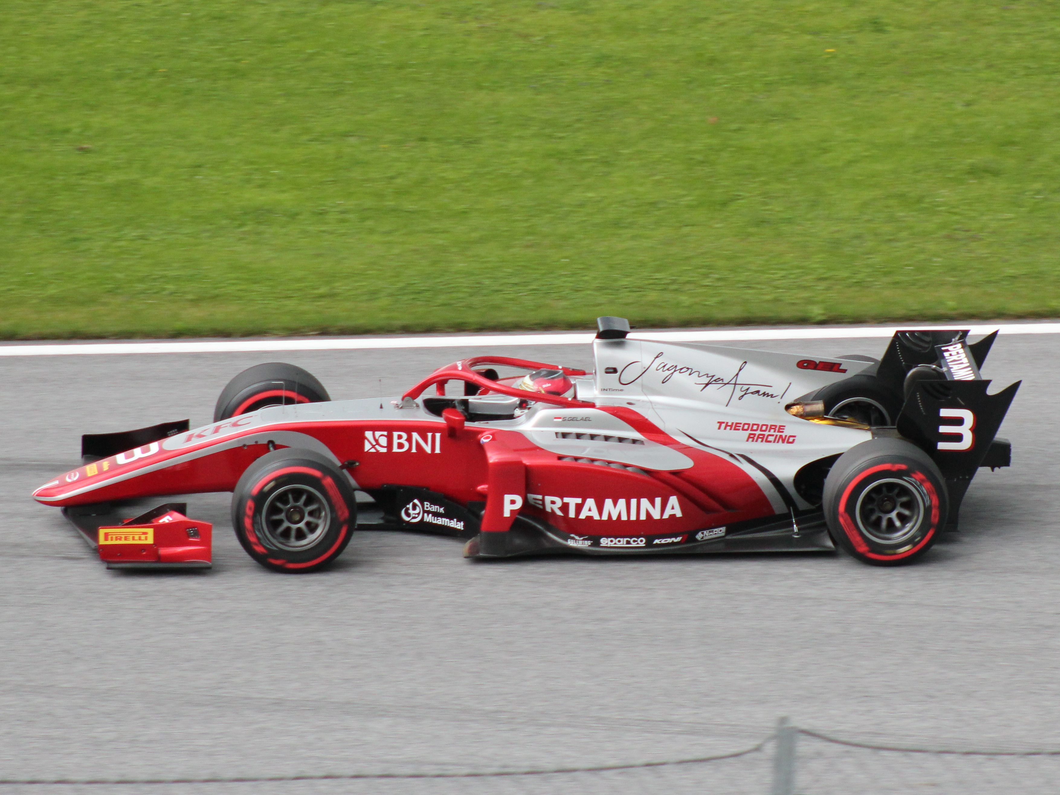 03 Sean Gelael beim Rennwochenende in Österreich 2018 (4)